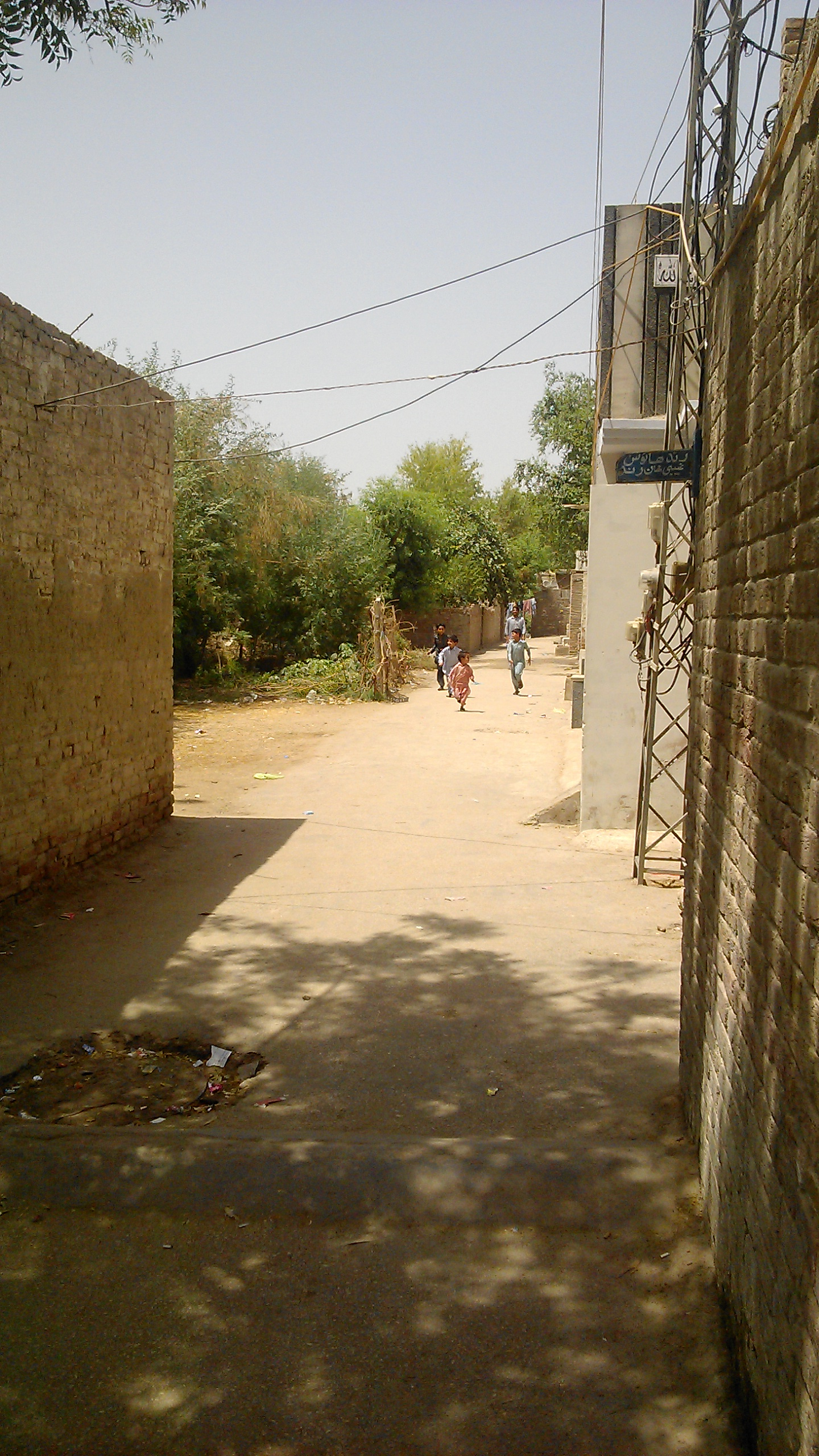 Nawabshah, Pakistan